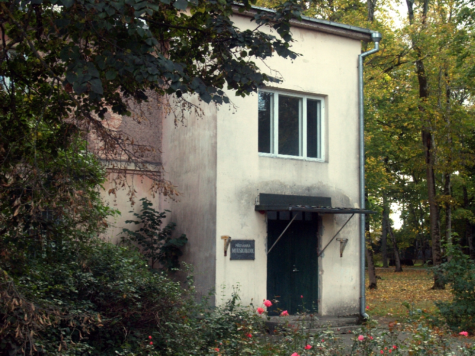 Põltsamaa vaated